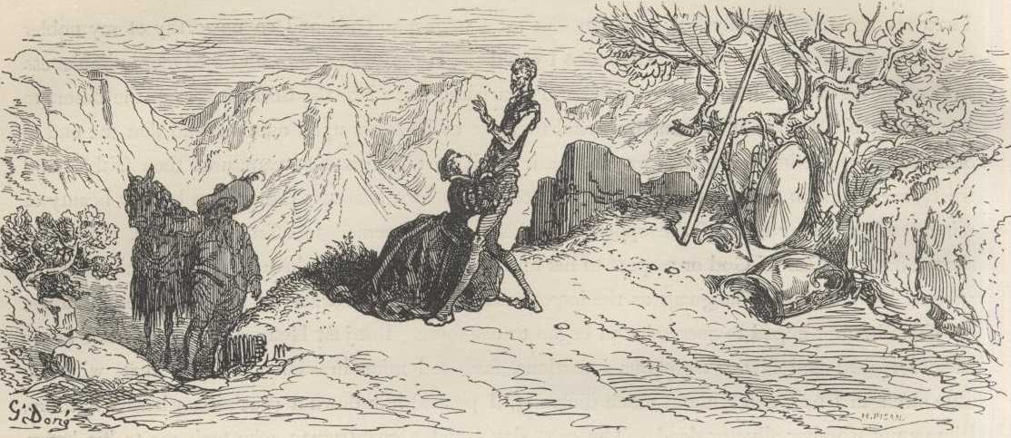 Ilustração de Gustave Doré para a edição de 1863 de "Dom Quixote" de Miguel de Cervantes